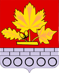 Герб Красносельского городского поселения, Краснодарский край, Россия